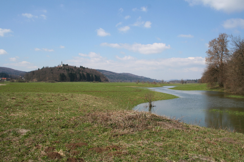 Radensko karst field near Grosuplje, Slovenia